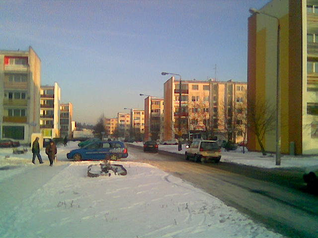 Ulica Wielorybia - zima 2005